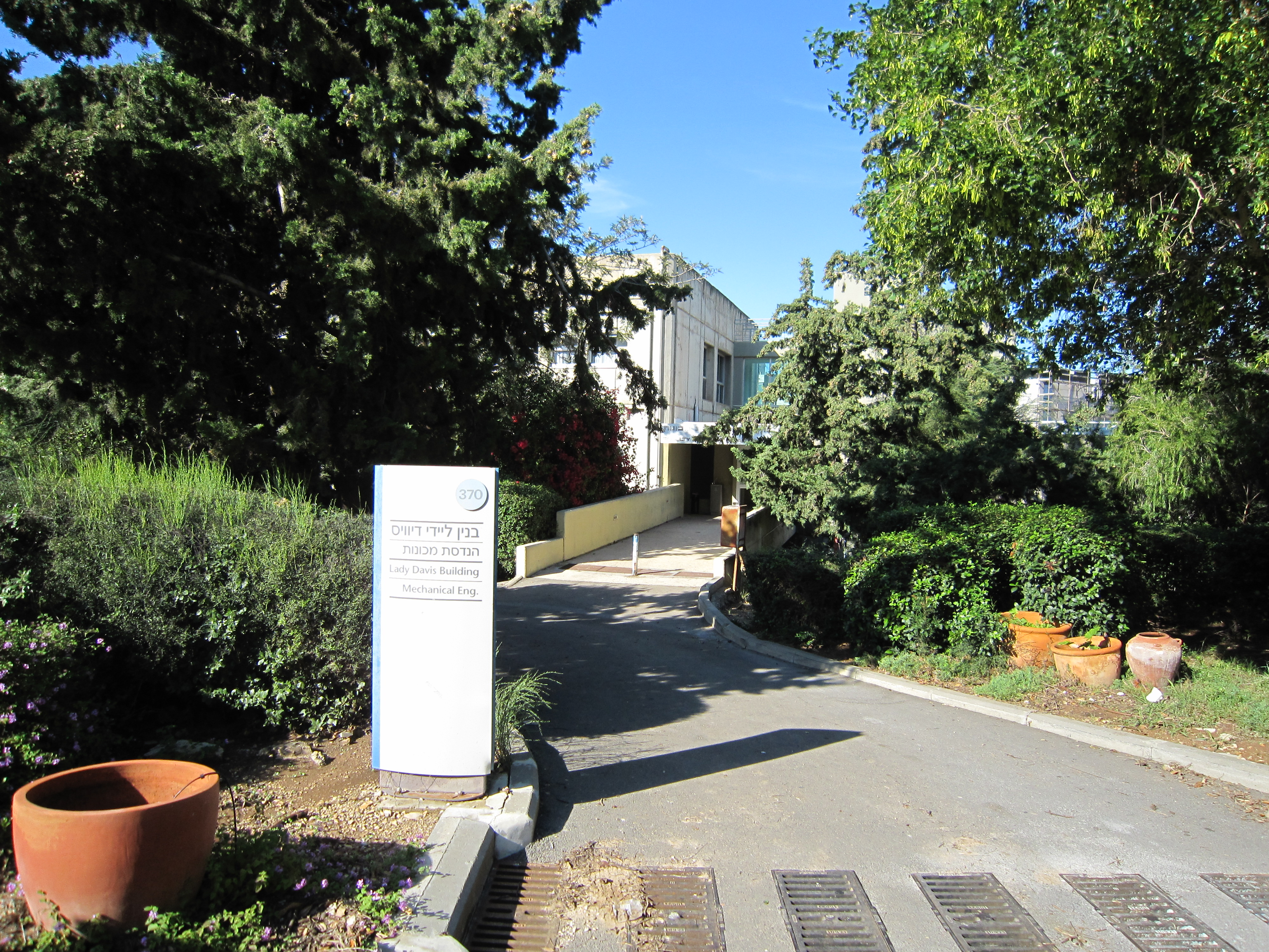 בניין הפקולטה להנדסת מכונות בטכניון